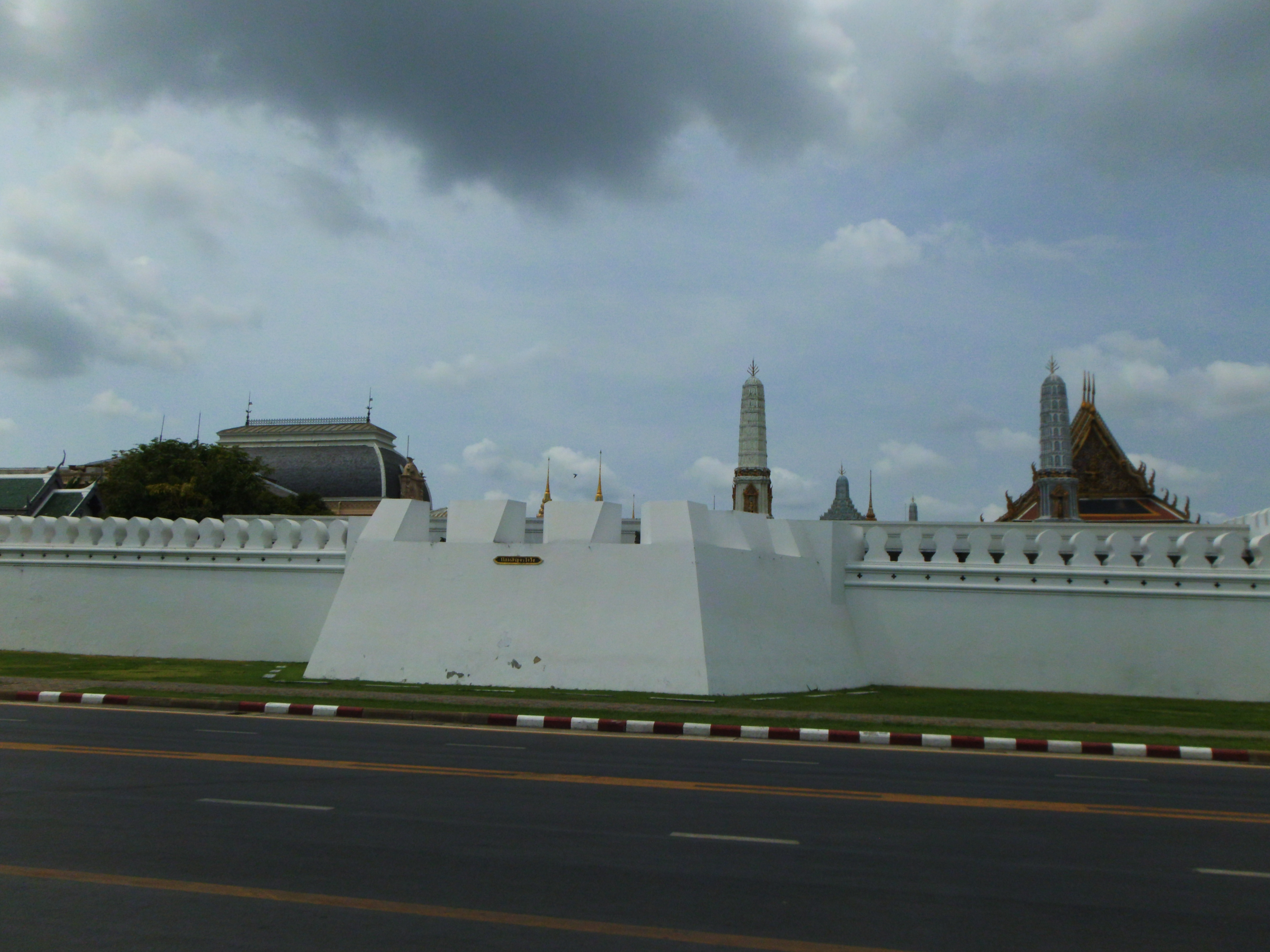 พระบรมมหาราชวังและวัดพระศรีรัตนศาสดาราม